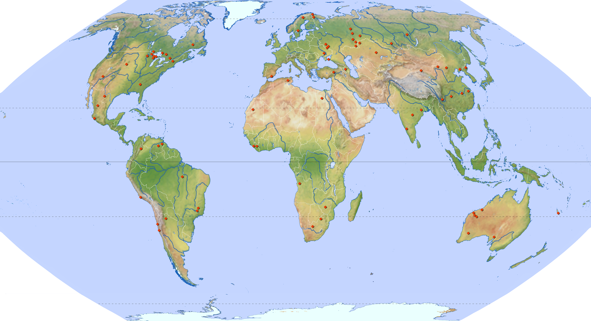 Fördergebiete / Lagerstätten für Eisen